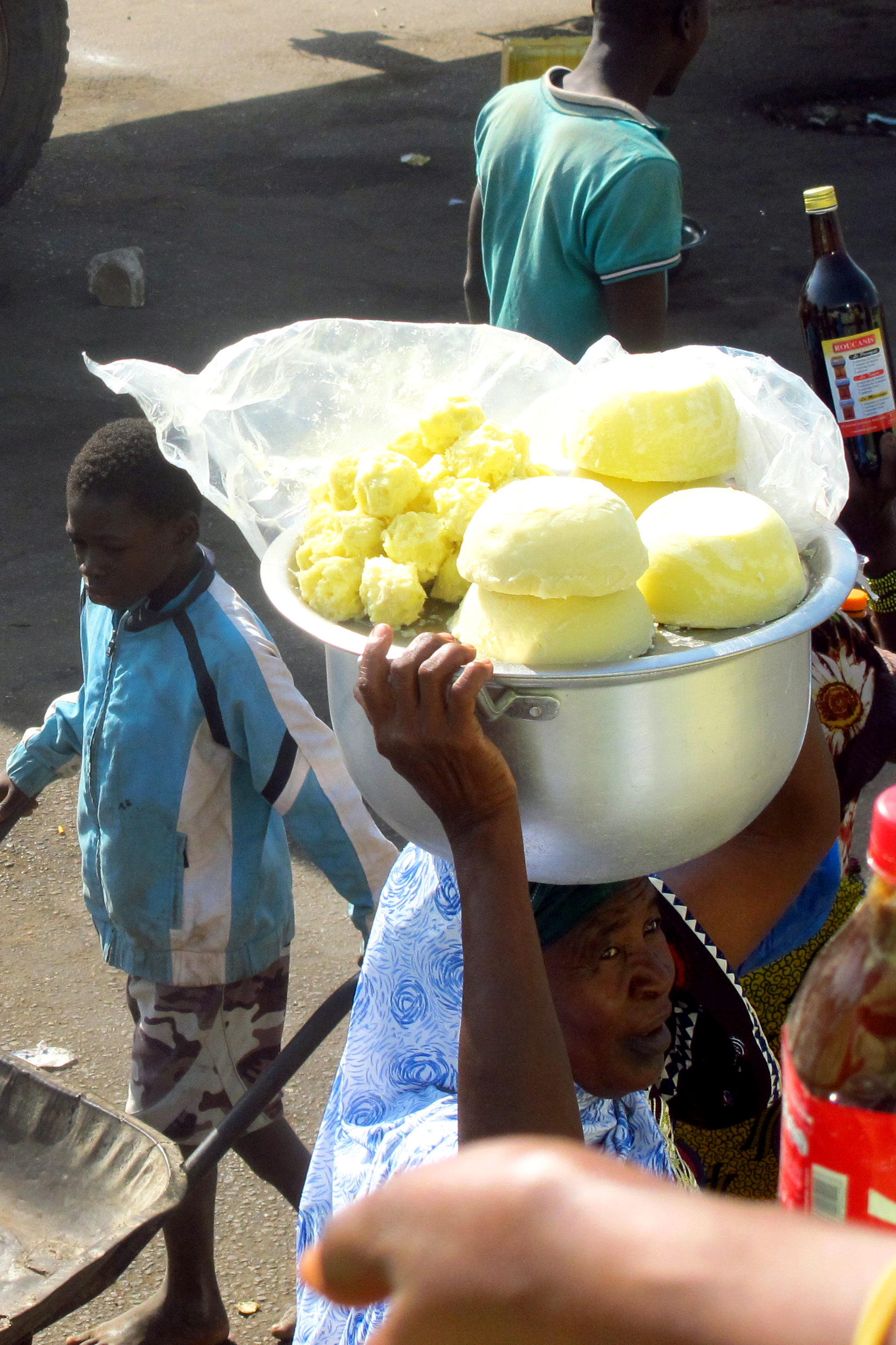 vendeuse de beurre de karité dans la commune de Tafiré, au nord de la Côte d'Ivoire This is an image of "African people at work" from Ivory Coast